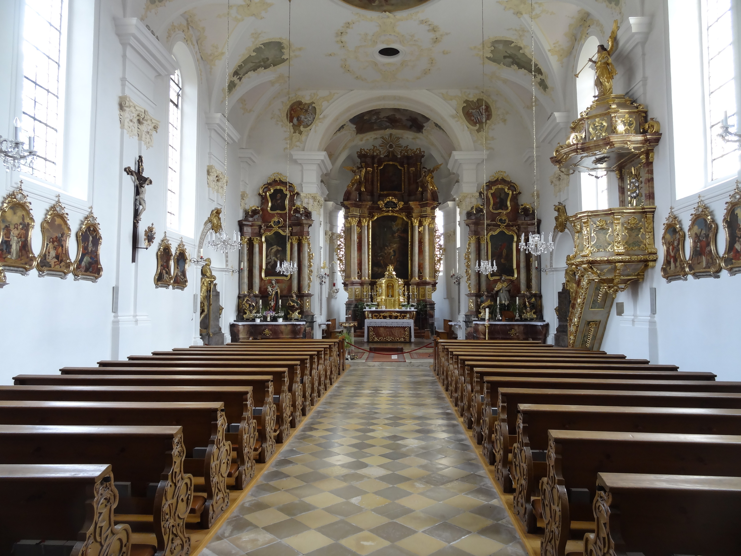 Innenansicht der Pfarrkirche St. Vitus in Offenstetten (Stadt Abensberg, Landkreis Kelheim)